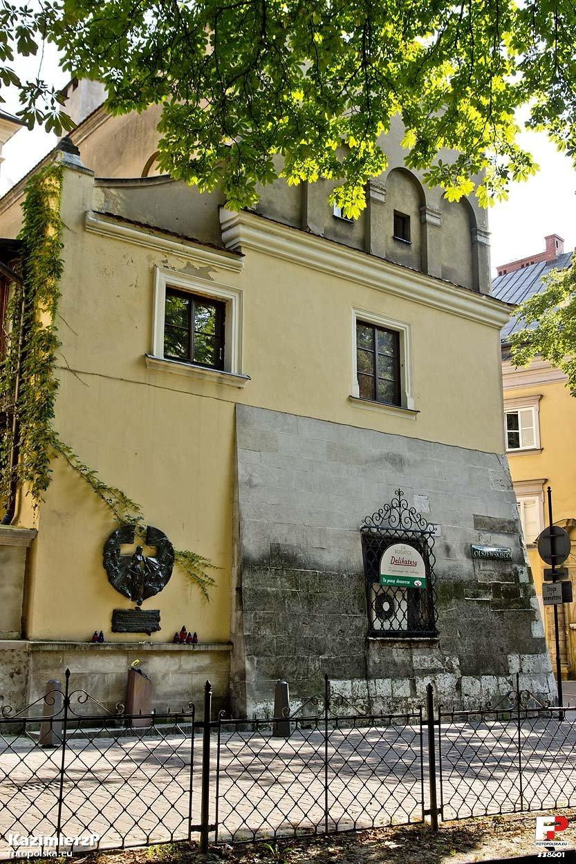 Ten klimatyzator pasuje tutaj jak ...